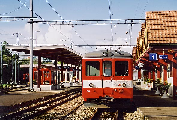 Bahnhof von Saignelégier, Jura, Schweiz.